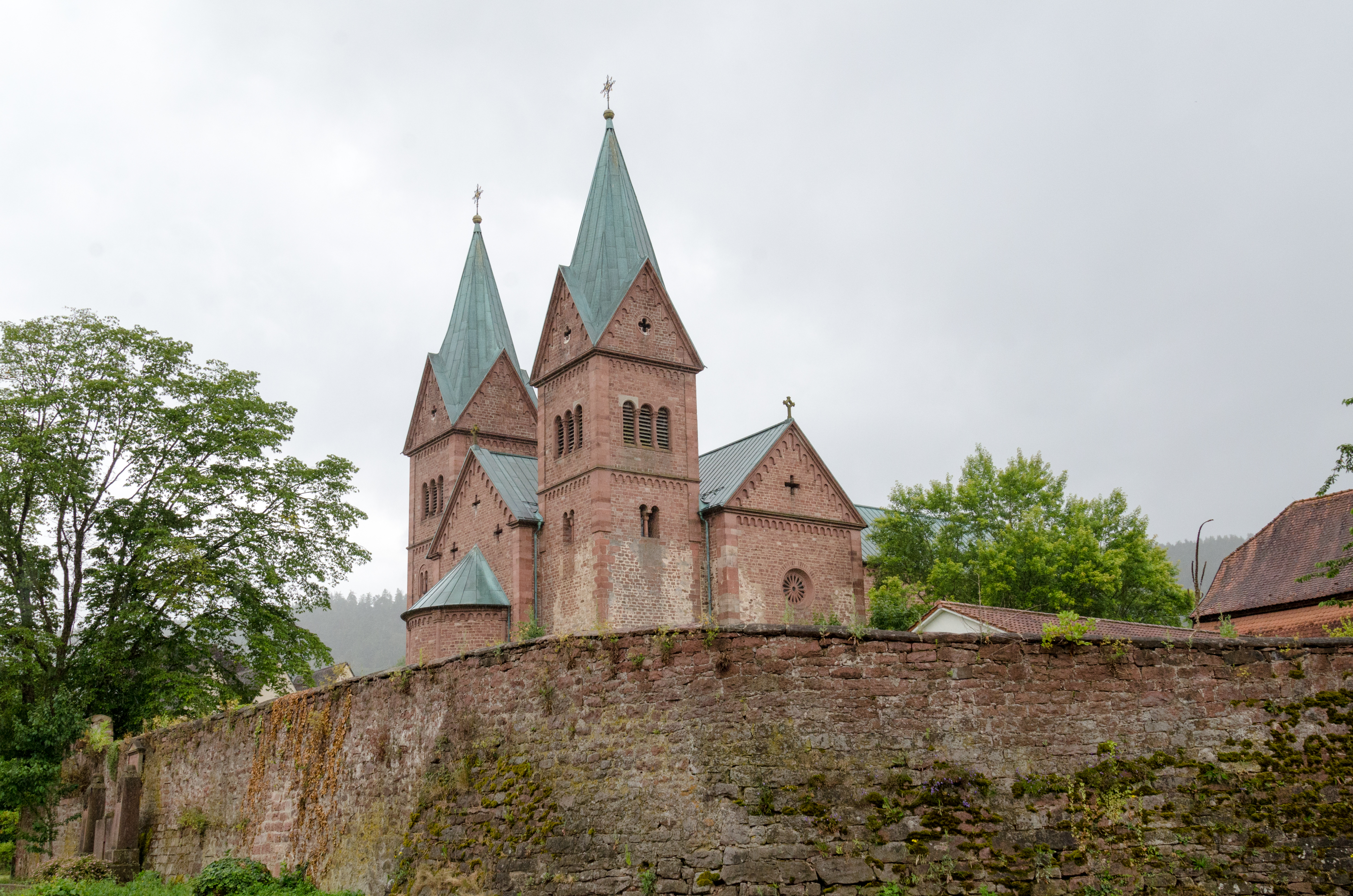 Neustadt am Main, Katholische Pfarrkirche St. Michael und St. Gertrudis, Exterior